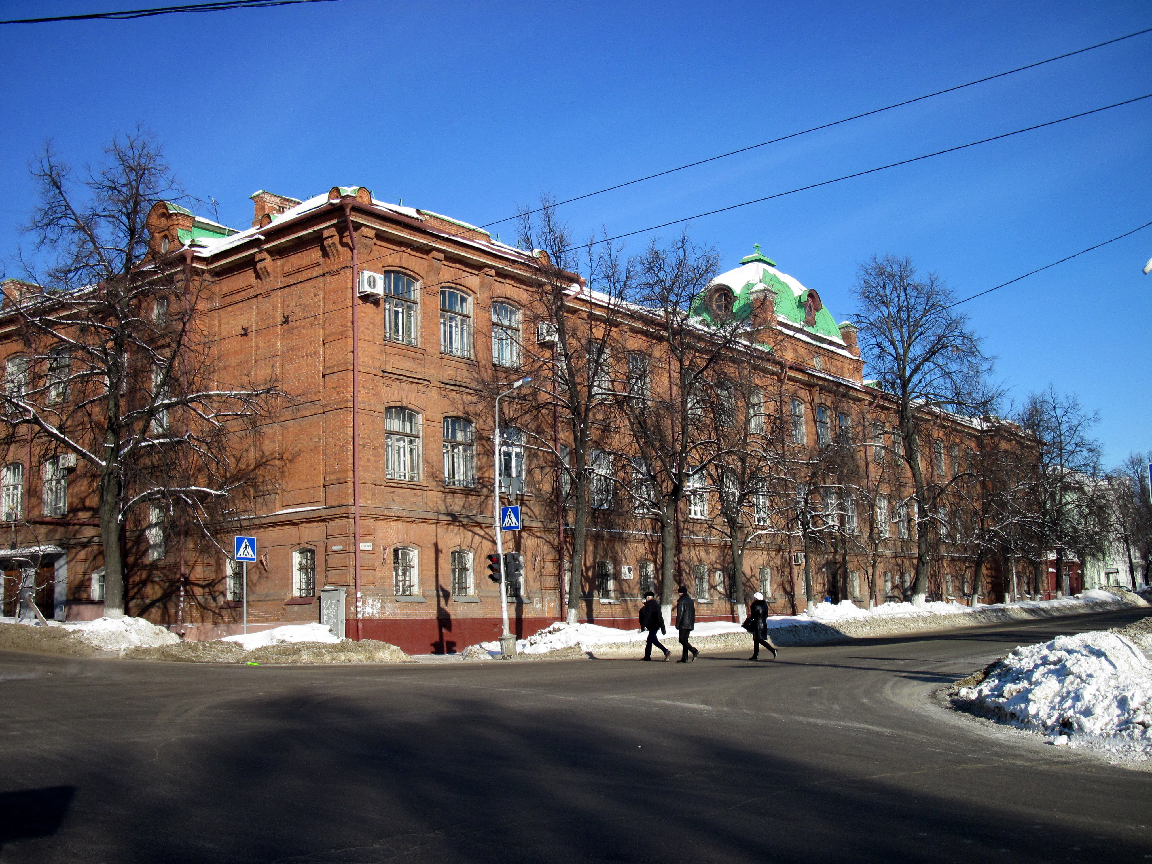 ПНИЭИ